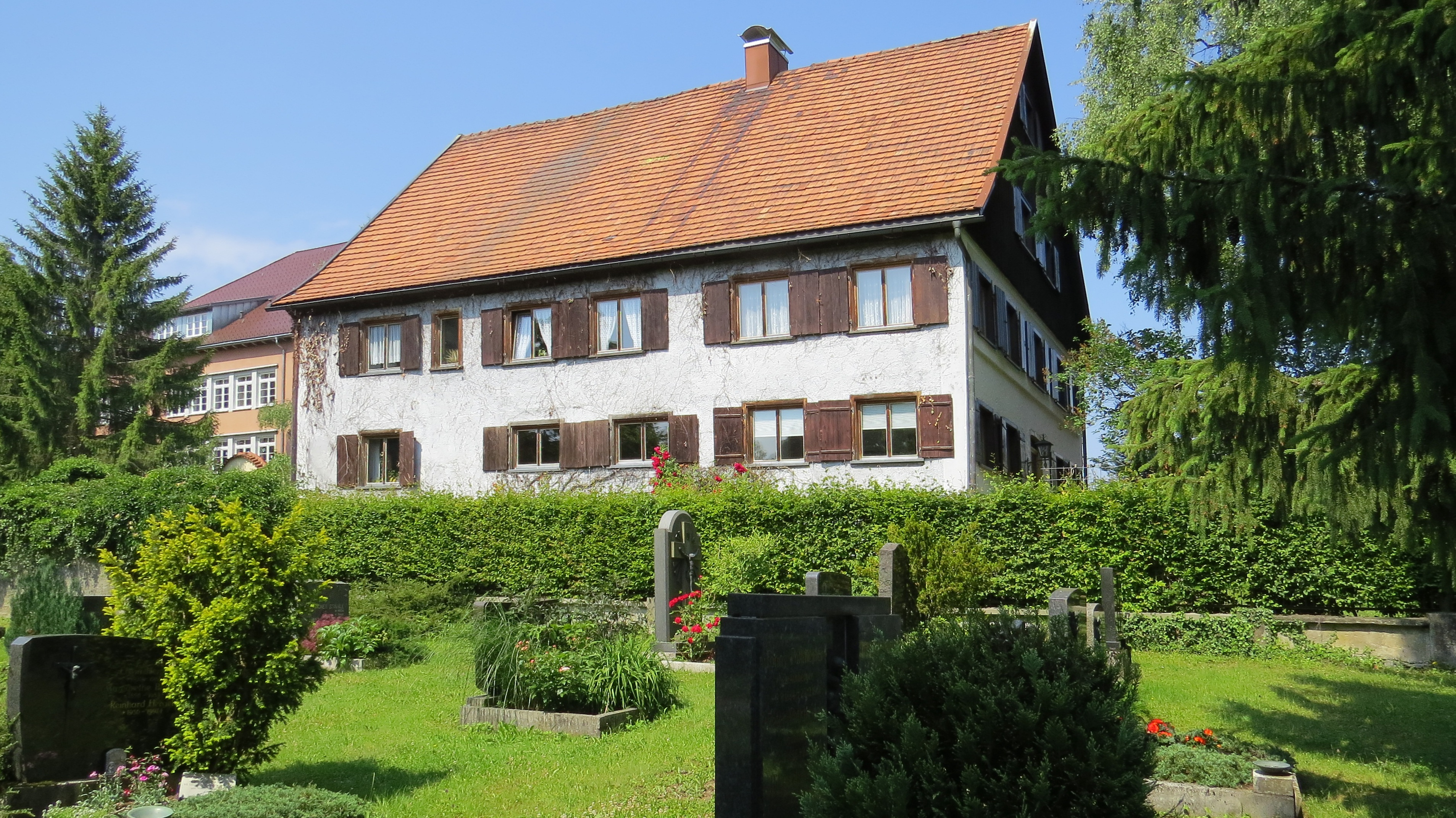 Ehem. Pfarrhaus in Lindenberg i. A.